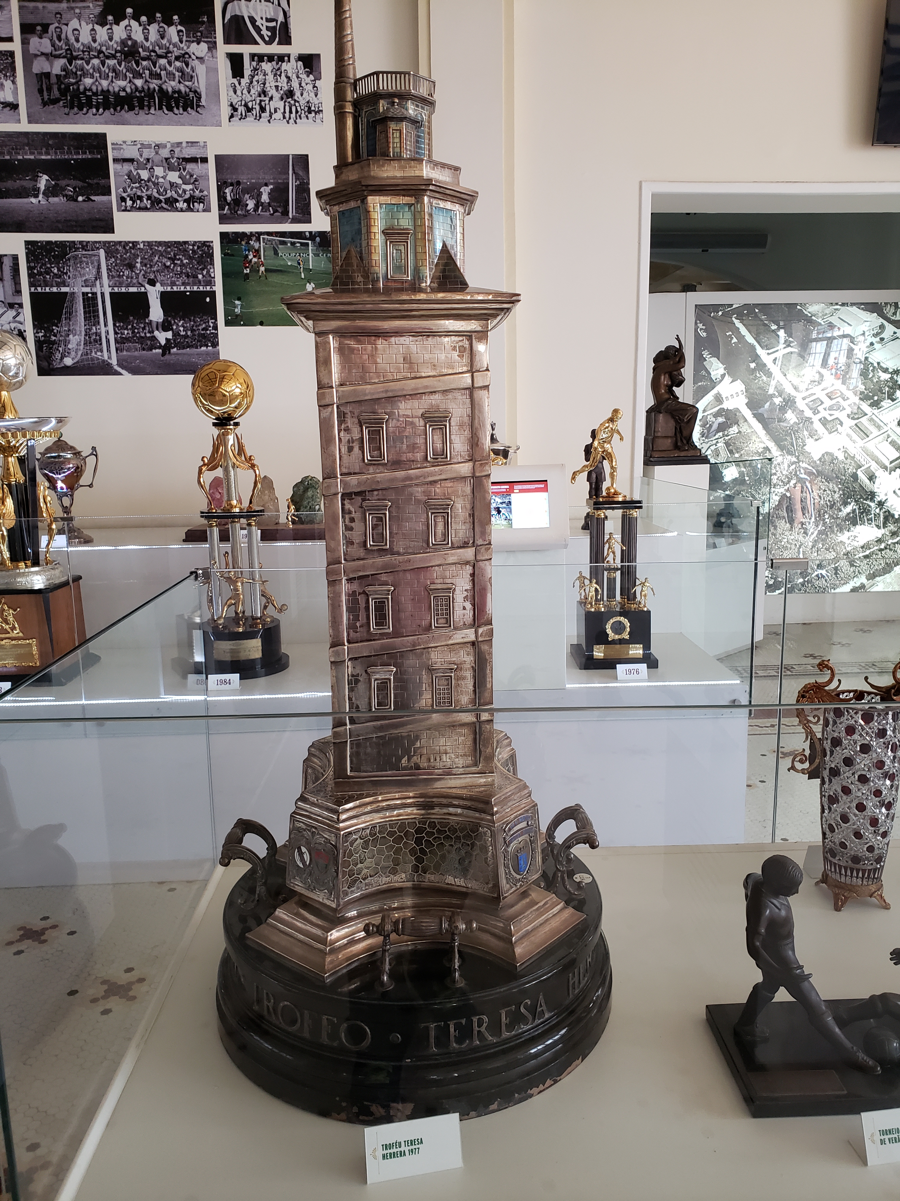 Taça Teresa Herrera de 1977, conquistada pelo Fluminense Footbal Club.